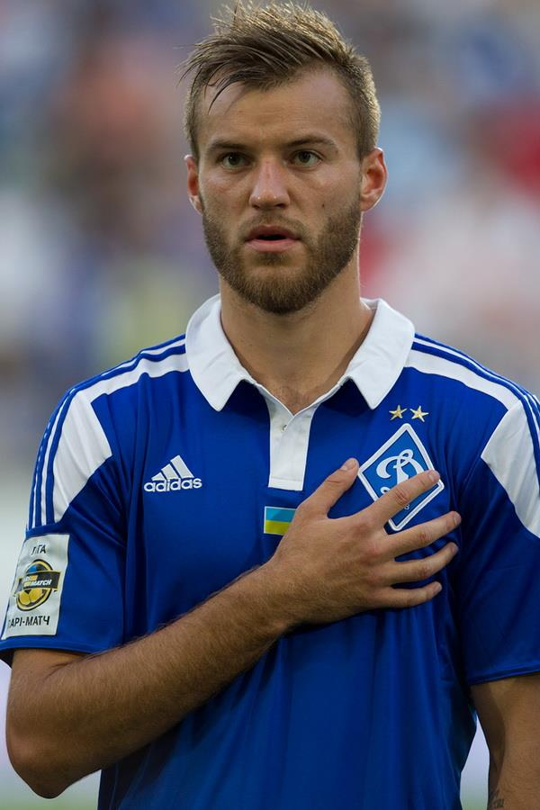 Андрій Ярмоленко - футболіст Динамо